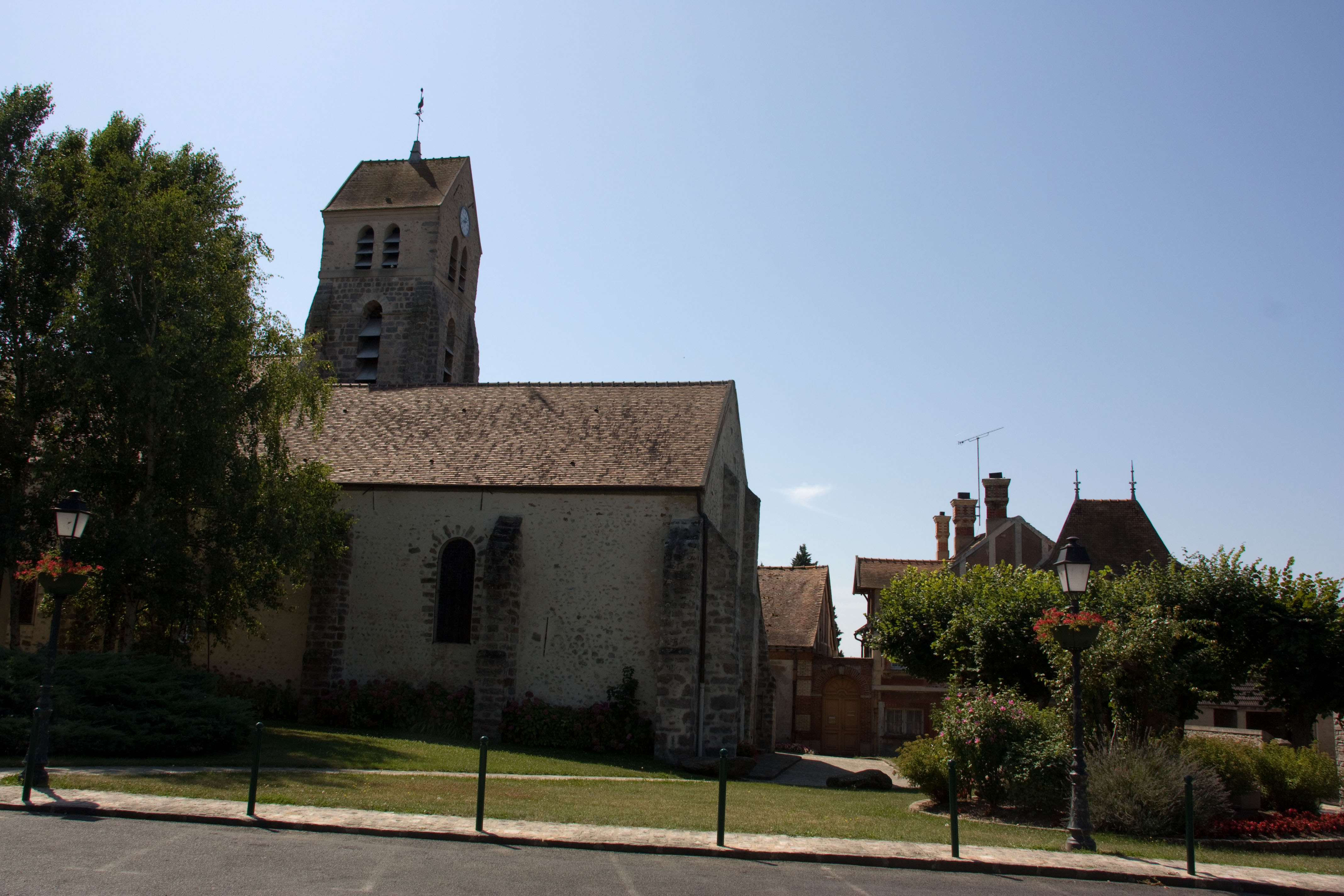 Eglise de Soisy-sur-Ecole, Soisy-sur-École, Essonne, France